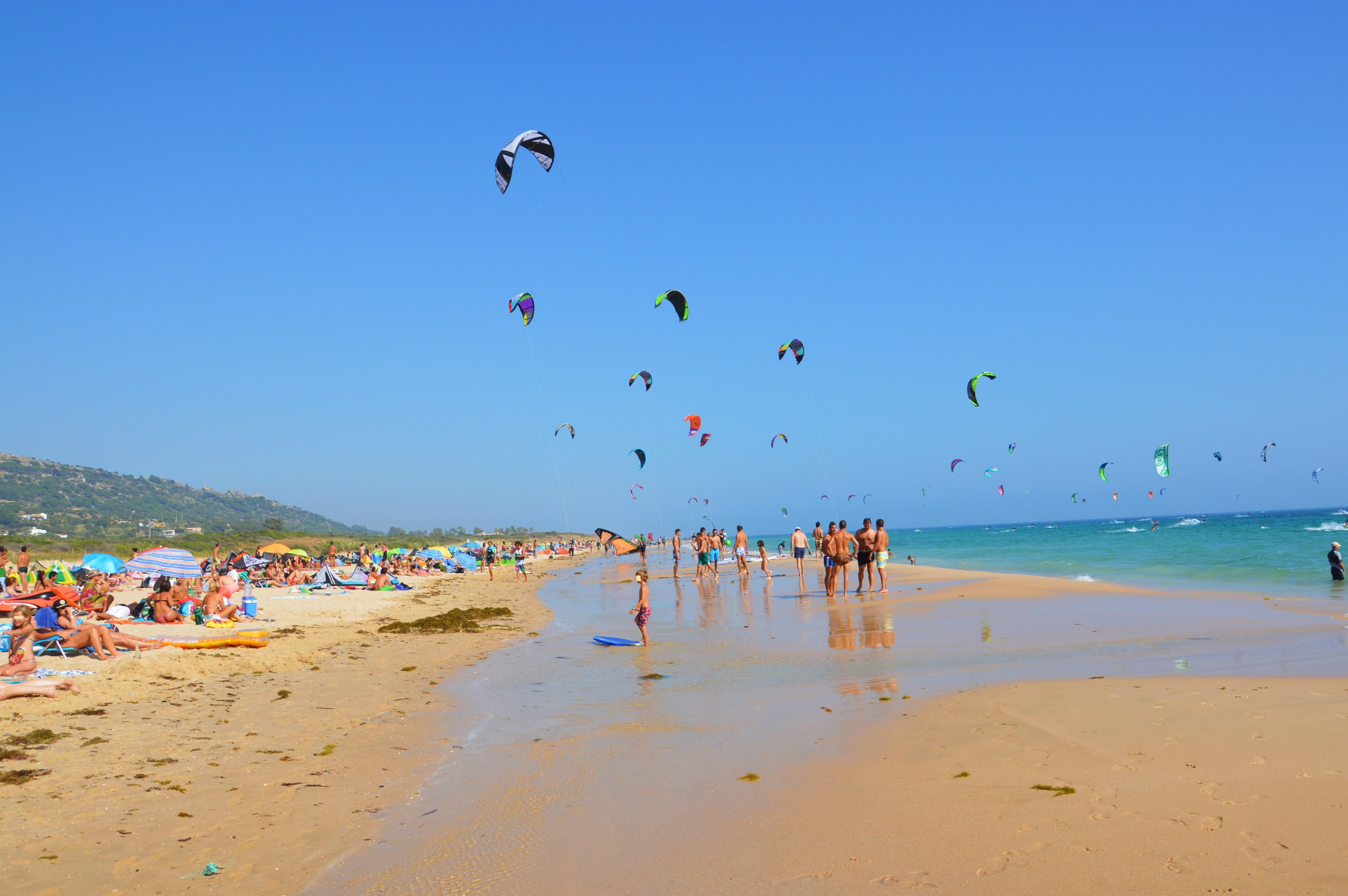 Vista de la playa de Valdevaqueros, Tarifa, Andalucía, España en julio de 2013